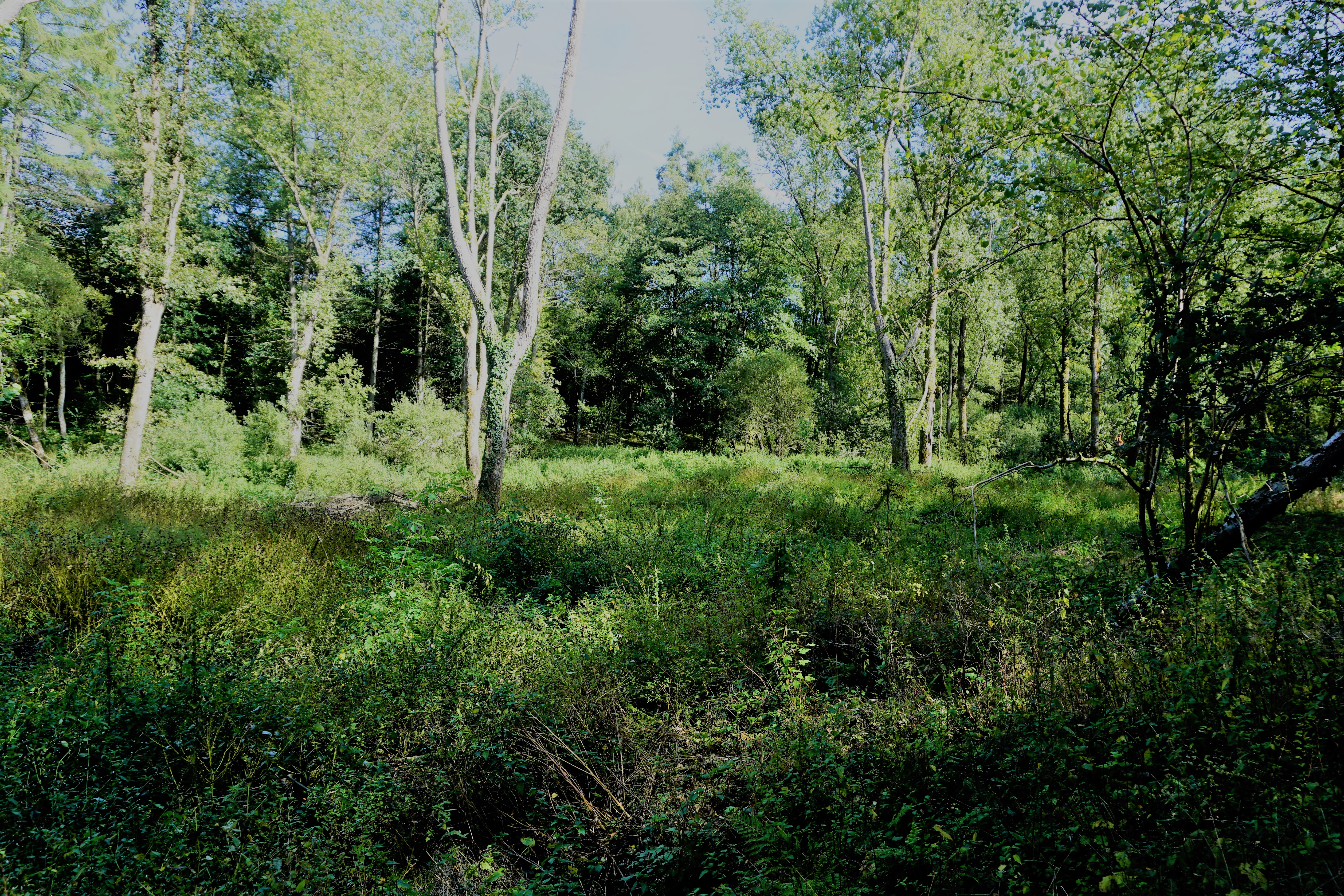 Autelbas. Restes du barrage de rétention dont l'eau servait autrefois de refroidisseur à l'usine sidérurgique de Steinfort.